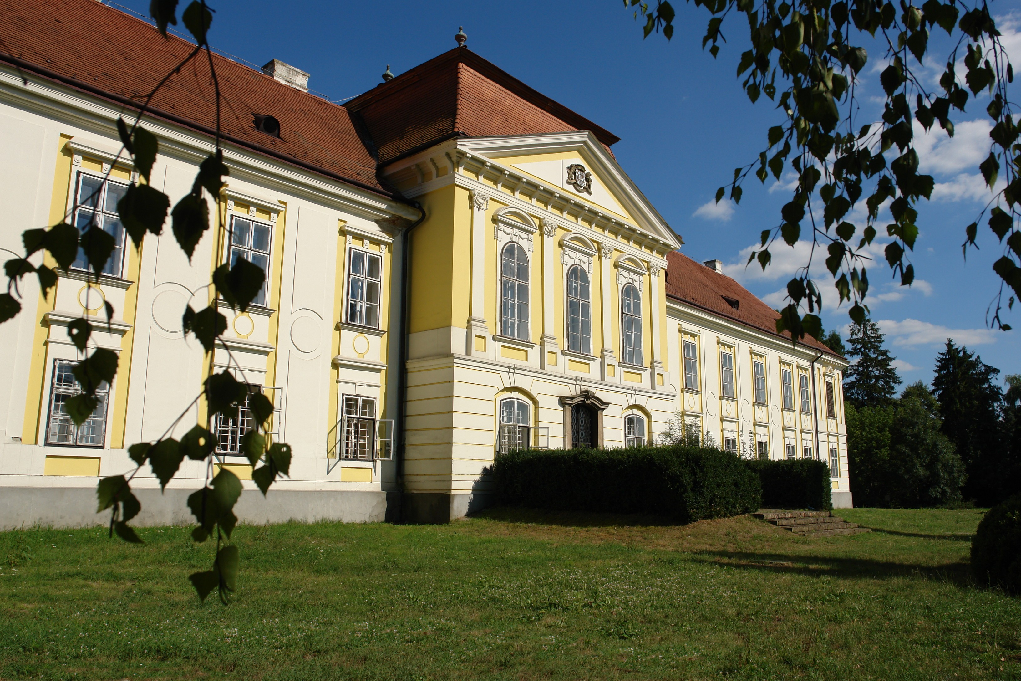 Batthyány-kastély és parkja, Zalaszentgrót This is a photo of a monument in Hungary. Identifier: 11110